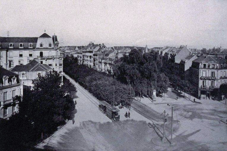 Strasbourg : Ruprechtsauer Allee = Allée de la Robertsau . 1906. Bibliothèque nationale et universitaire de Strasbourg